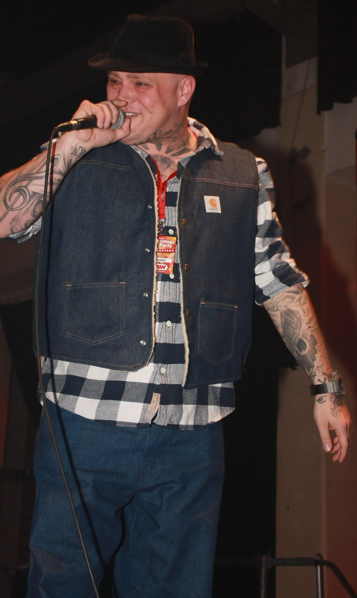 Hagen Stoll alias Jaschke von Haudegen Live in Magdeburg am 2012-03-10 by NicoJenner